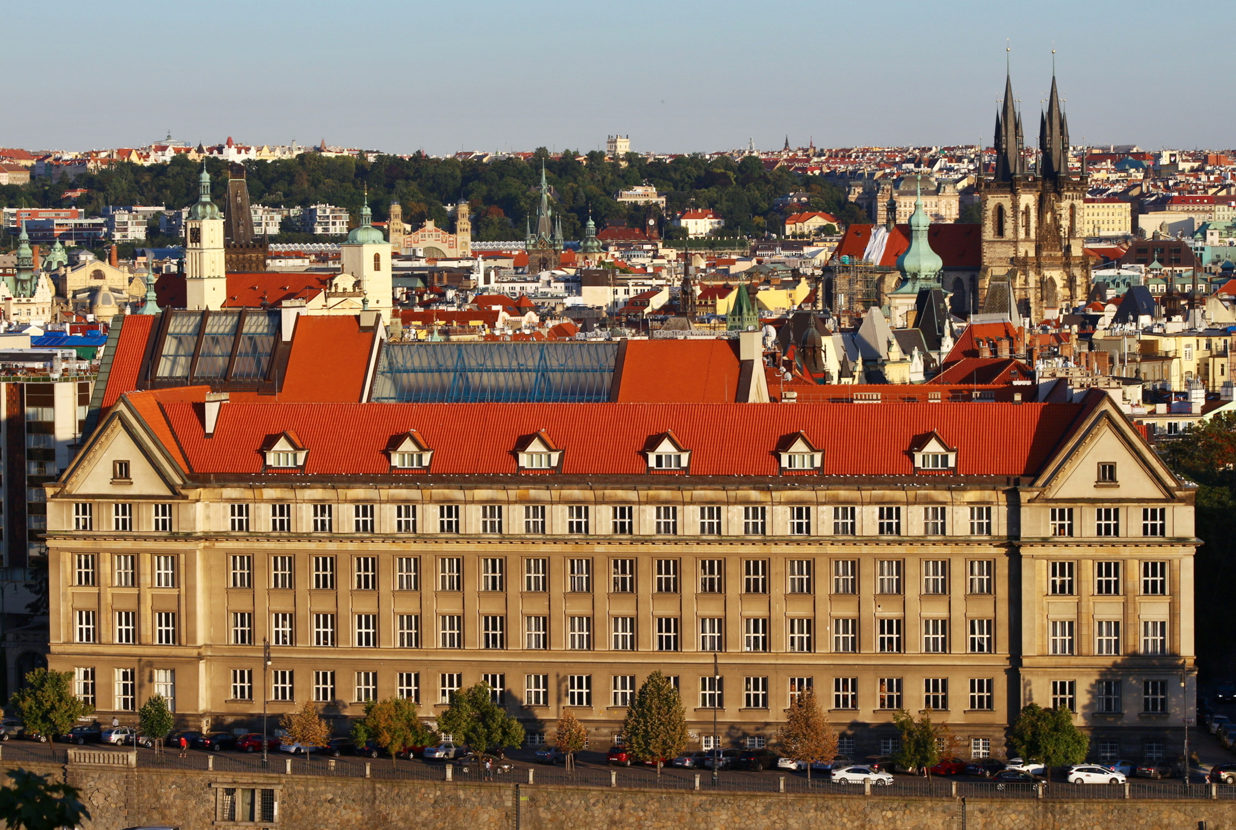 Pohled na Staré Město z Letné